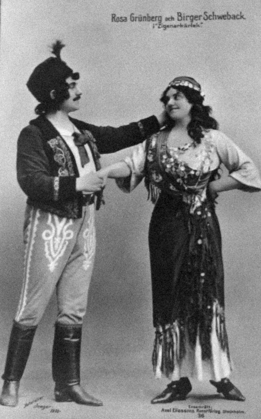 Rosa Grüberg och Birger Schweback i "Zigenarkärlek". Hofatelier Jaeger, 1910.